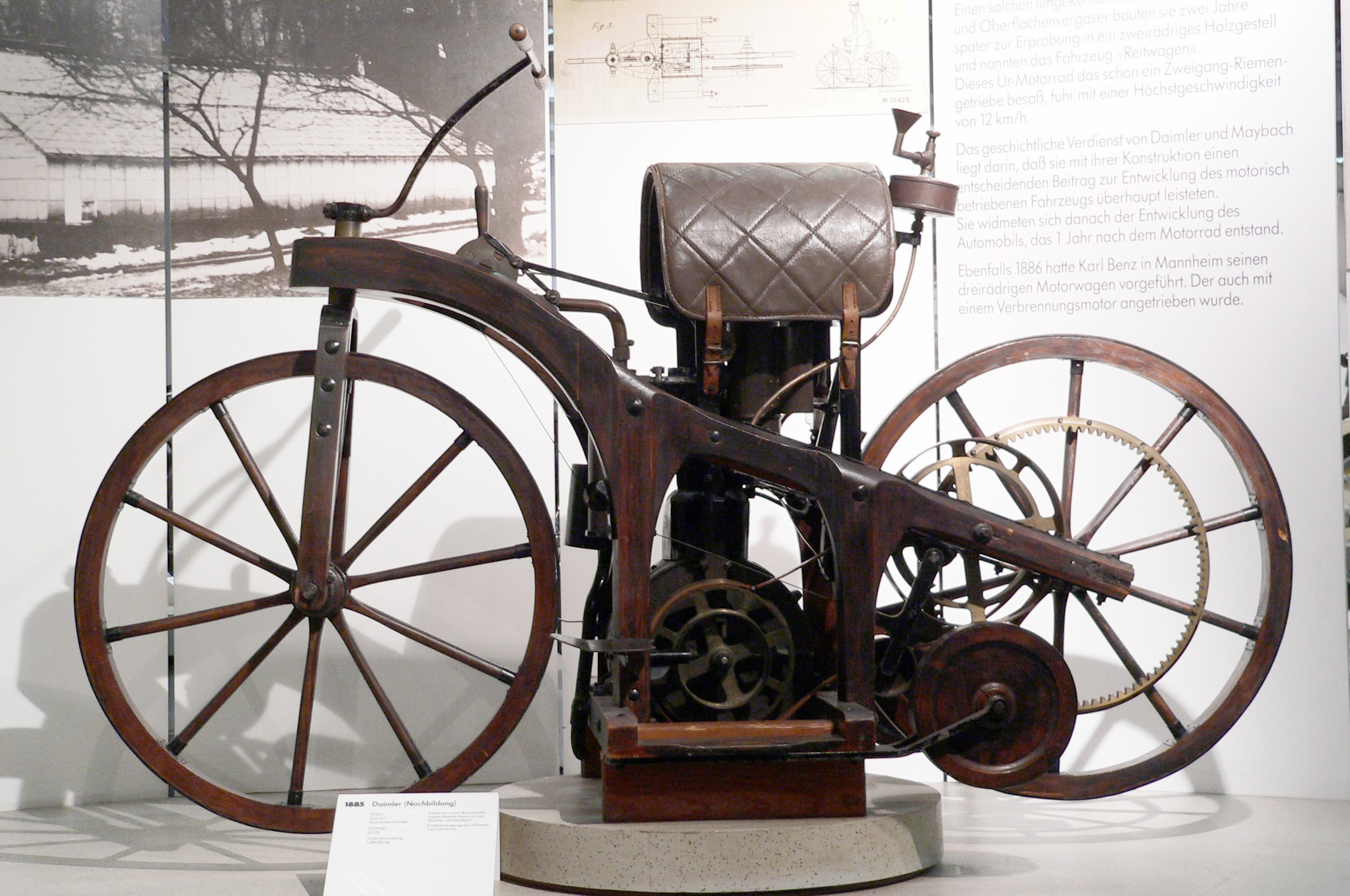 First motorcycle called "Reitwagen" by Gottlieb Daimler and Wilhelm Maybach (1885) (264 cm³, Einzylinder-Viertakt-Motor, 0,5 PS, Glührohrzündung, Luftkühlung)